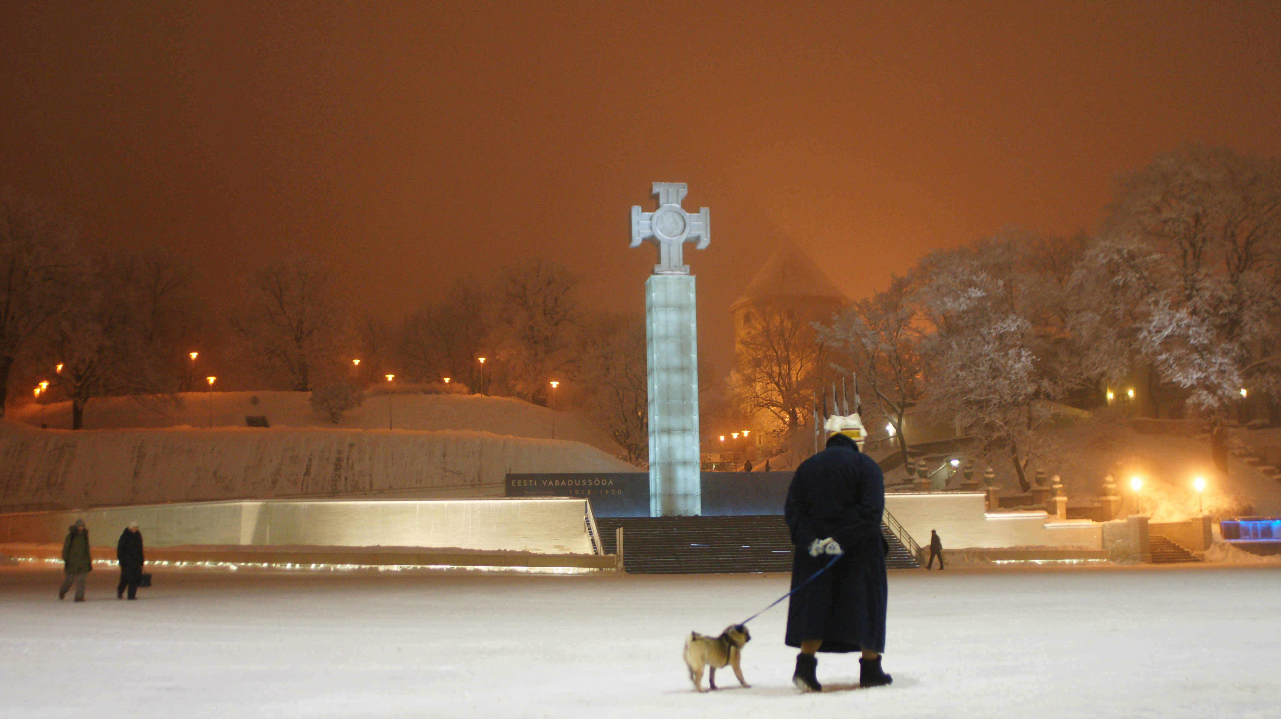 Vabadussõja Võidusammas